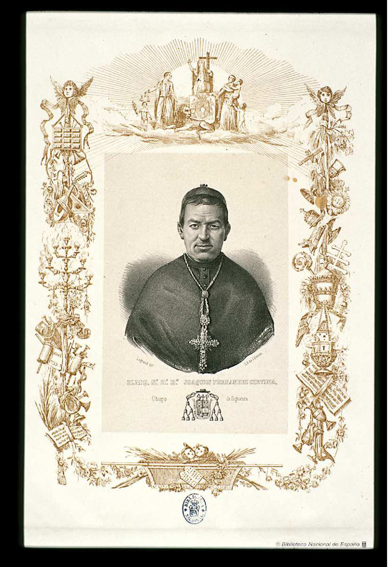 Retrato de Joaquín Fernández Cortina, obispo de Sigüenza, litografía de Luis Carlos Legrand